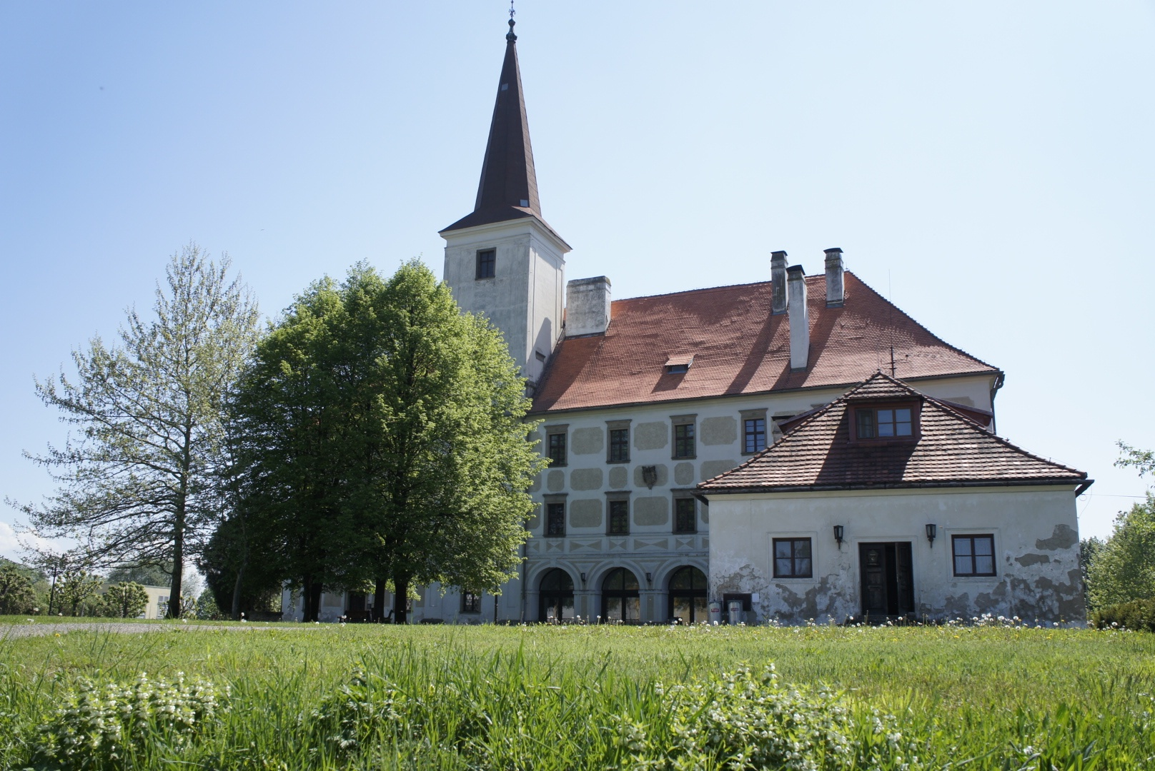 Zámek Chropyně, nám. Svobody 30, Chropyně